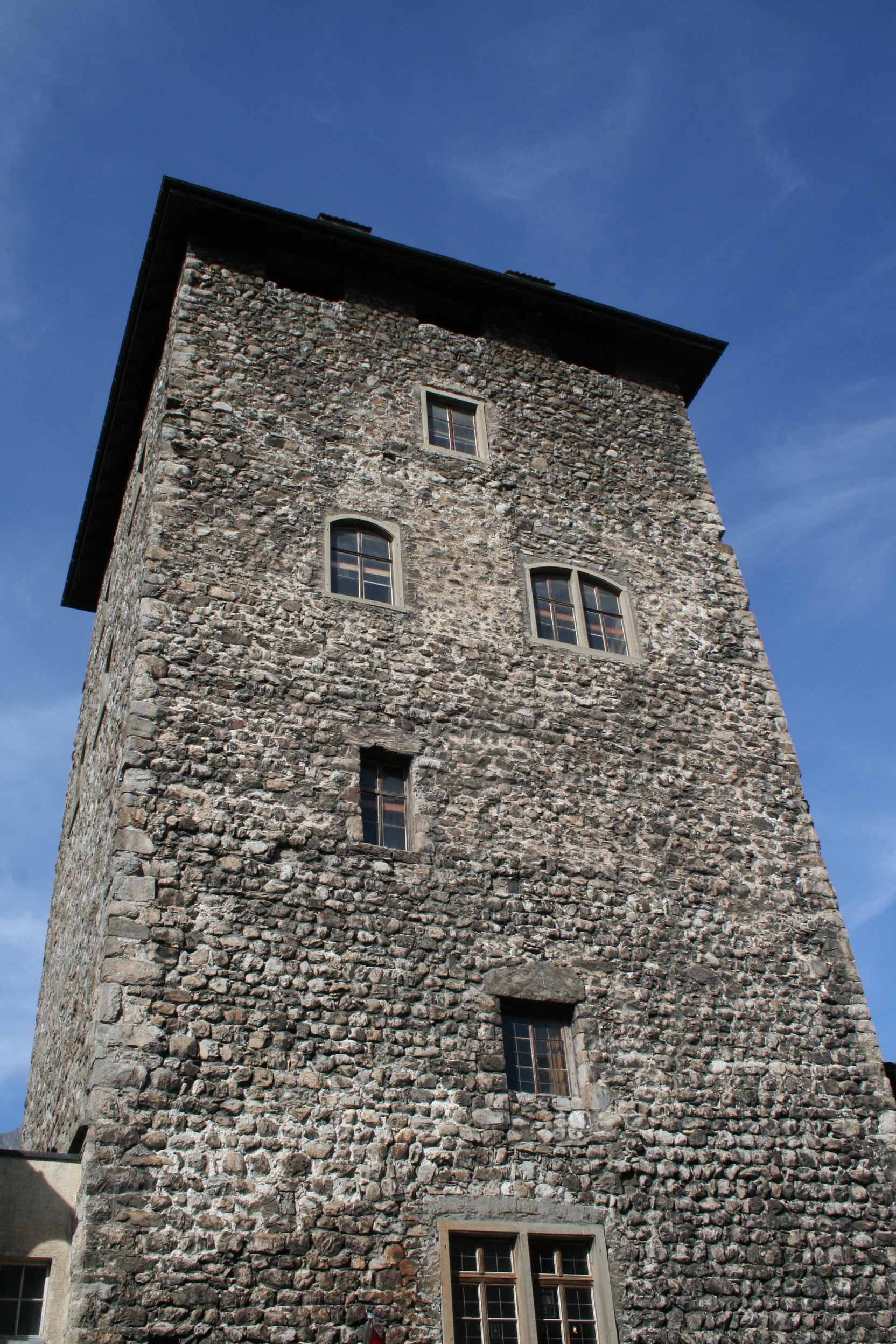 Schloss Brandis in Maienfeld: Turm